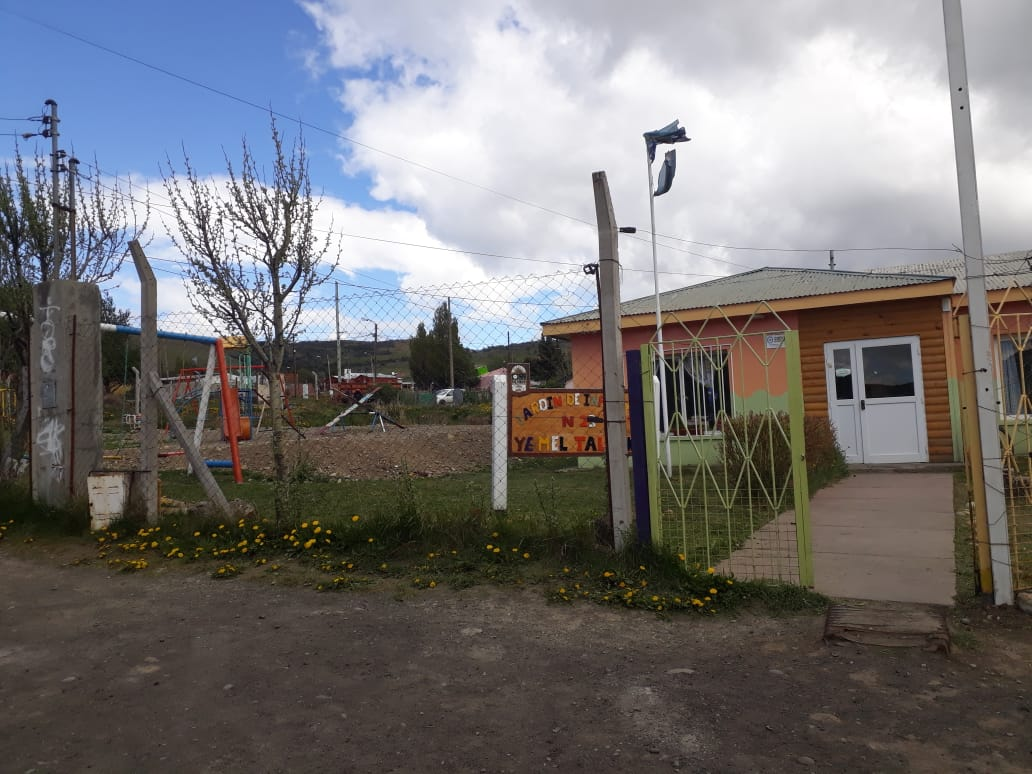 La siguiente foto muestra donde y como es el jardin N°23 "YEMEL TALENKE"